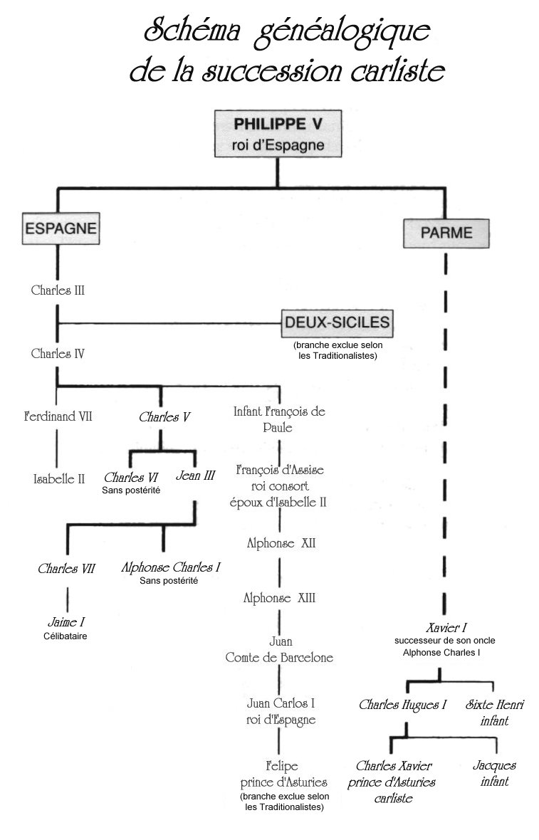 Tableau généalogique carliste - Licensing Catégorie:Schémas